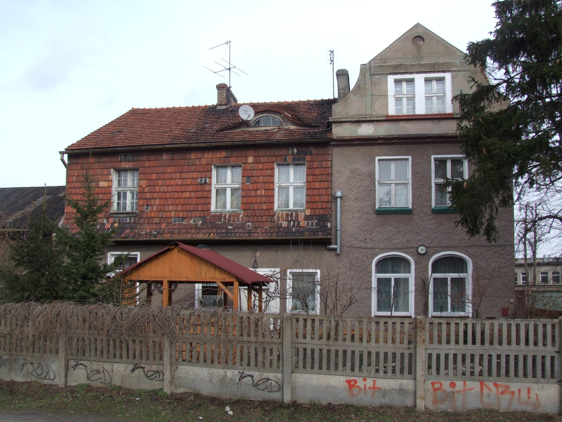 The building of the former Upper Town railway station in Zielona Góra. Budynek dawnego dworca Kolejki Szprotawskiej - Zielona Góra-Górne Miasto (before 1945 Grünberg-Oberstadt) przy ulicy Ogrodowej w Zielonej Górze Author: Mohylek 15:49, 28 February 2007 (UTC)